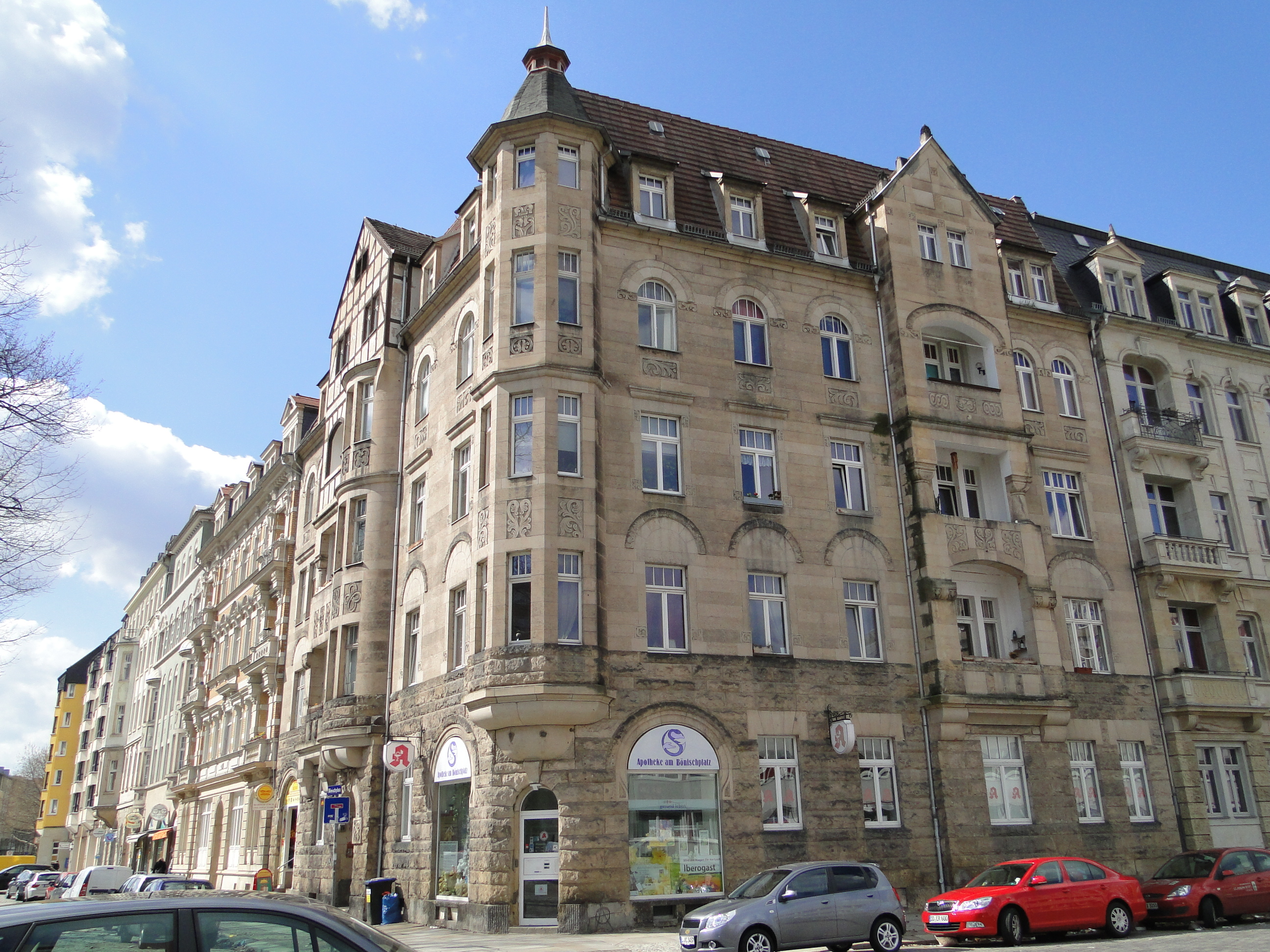 Kulturdenkmal (Lage sh. Dateiname) Gemarkung Altstadt II in Dresden